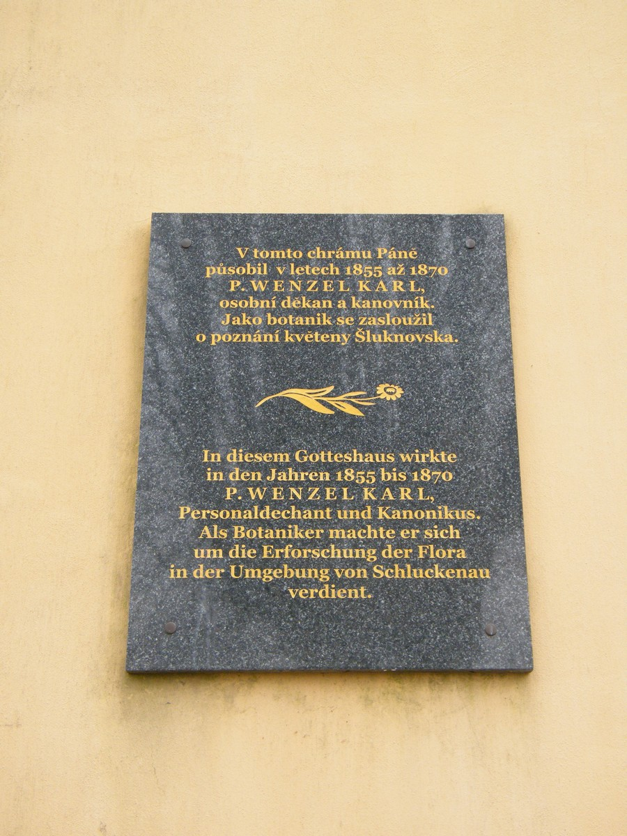 Kostel svatého Vavřince v Království u Šluknova